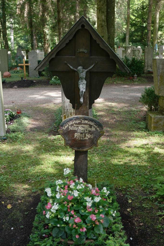 Grab des Sängers und Komponisten Alfred Hüni (1925-2000) und der Sängerin Felicie Hüni-Mihacsek (1892-1976) auf dem Waldfriedhof in München-Solln